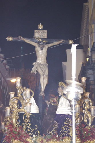 Cristo de las Siete Palabras. Semana Santa en Sevilla. Año 2007 Foto realizada y propiedad de Ángel Chacón